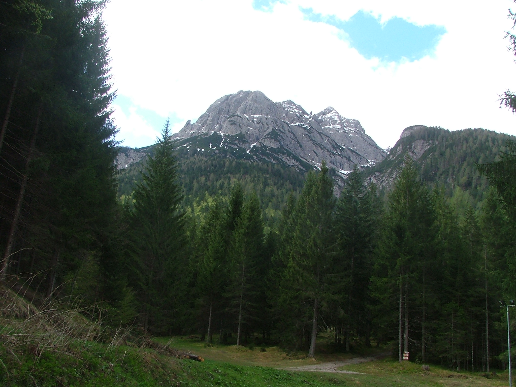 Monte Miaron at Lorenzago di Cadore, Belluno, Dolomites, Veneto, Italy